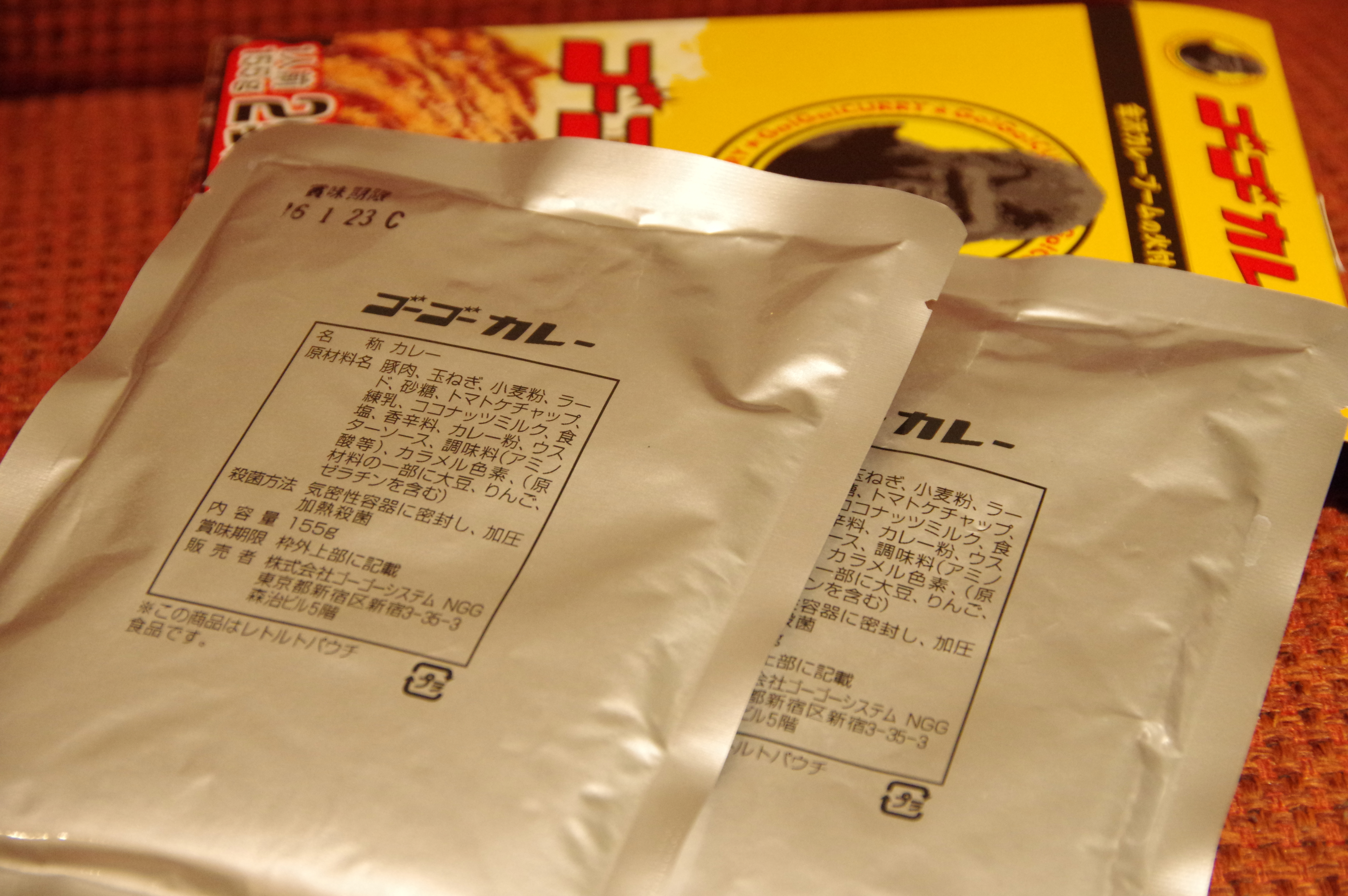 ゴーゴーカレー_008